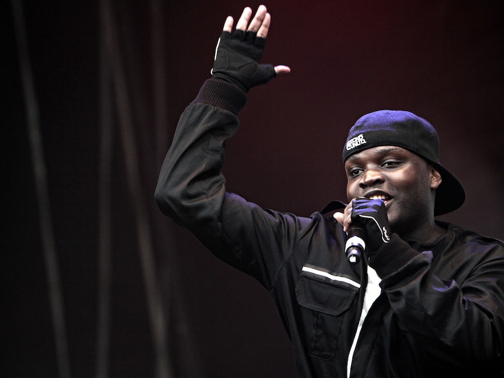 Valete ao vivo